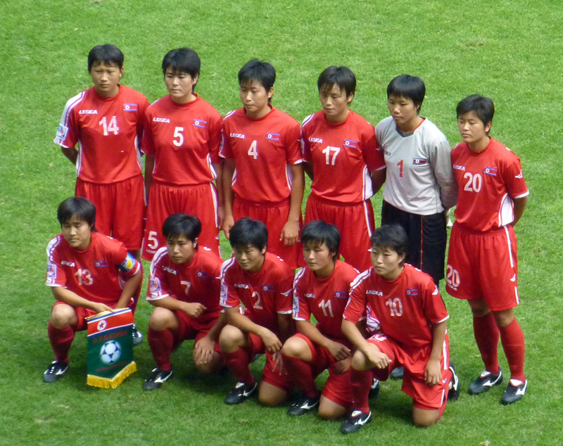 FIFA U-20-Weltmeisterschaft 2010 der Frauen, Nordkoreanische Nationalmannschaft, Spiel 20 in Augsburg